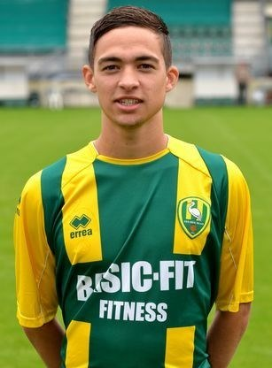 Stanley Elbers